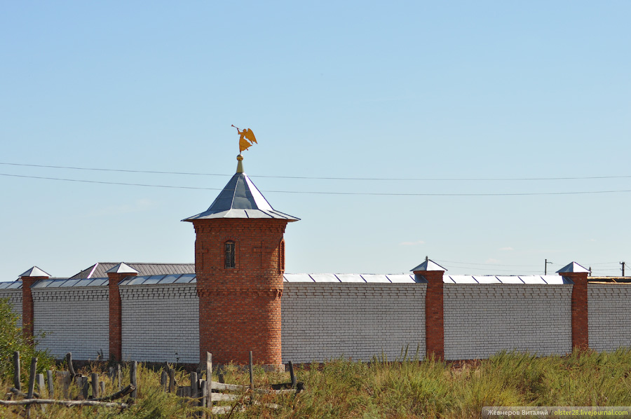 Ограда Свято-Никольского монастыря, посёлок Монастырский, Саратовская область